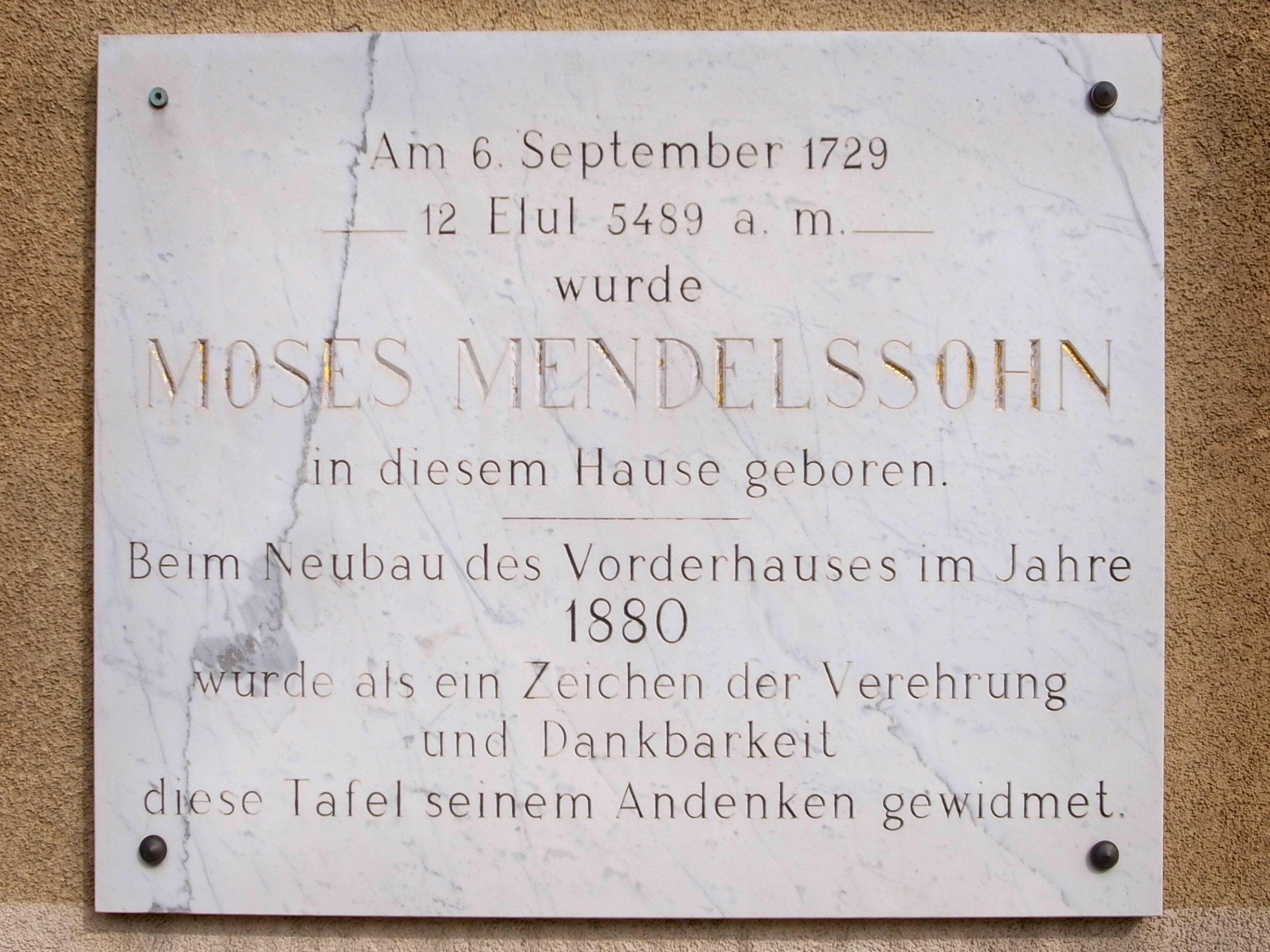 Moses Mendelssohn Gedenktafel am Geburtshaus in Dessau. Das Haus ist nicht erhalten. Die Tafel befindet sich an den Wohnblock der heute dort steht.